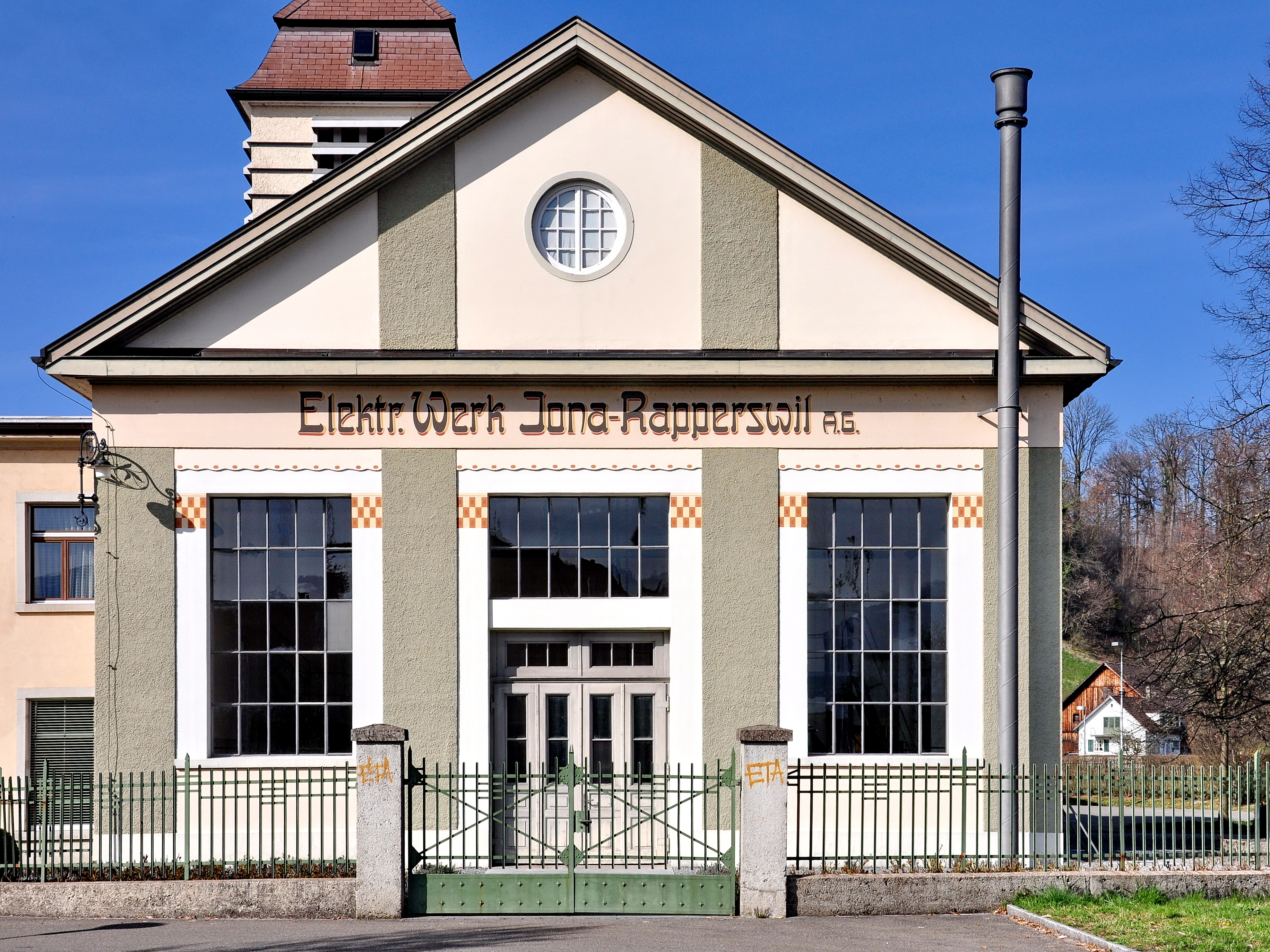 Elektrizitätswerke Jona-Rapperswil A.G. in Jona (Switzerland)